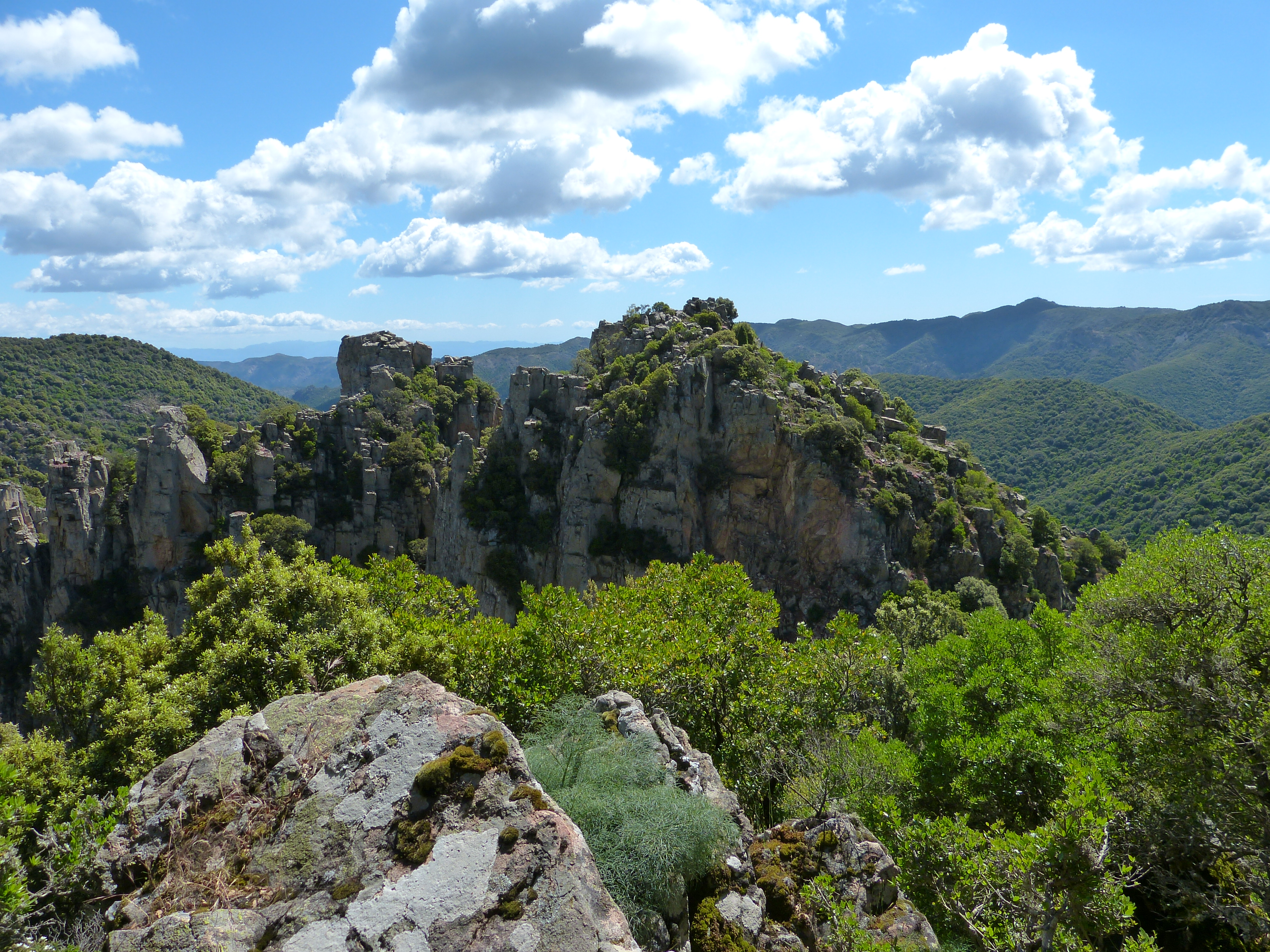 Punta Sebera, Gutturu Mannu, Parco del Sulcis, Sardinien